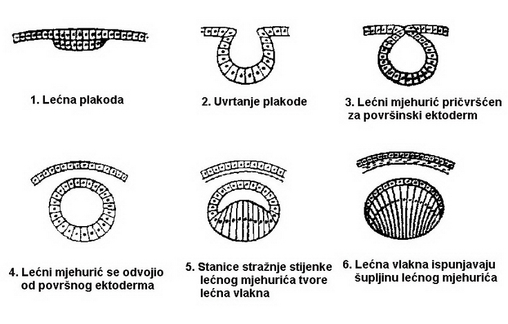 Crtež razvoja leće